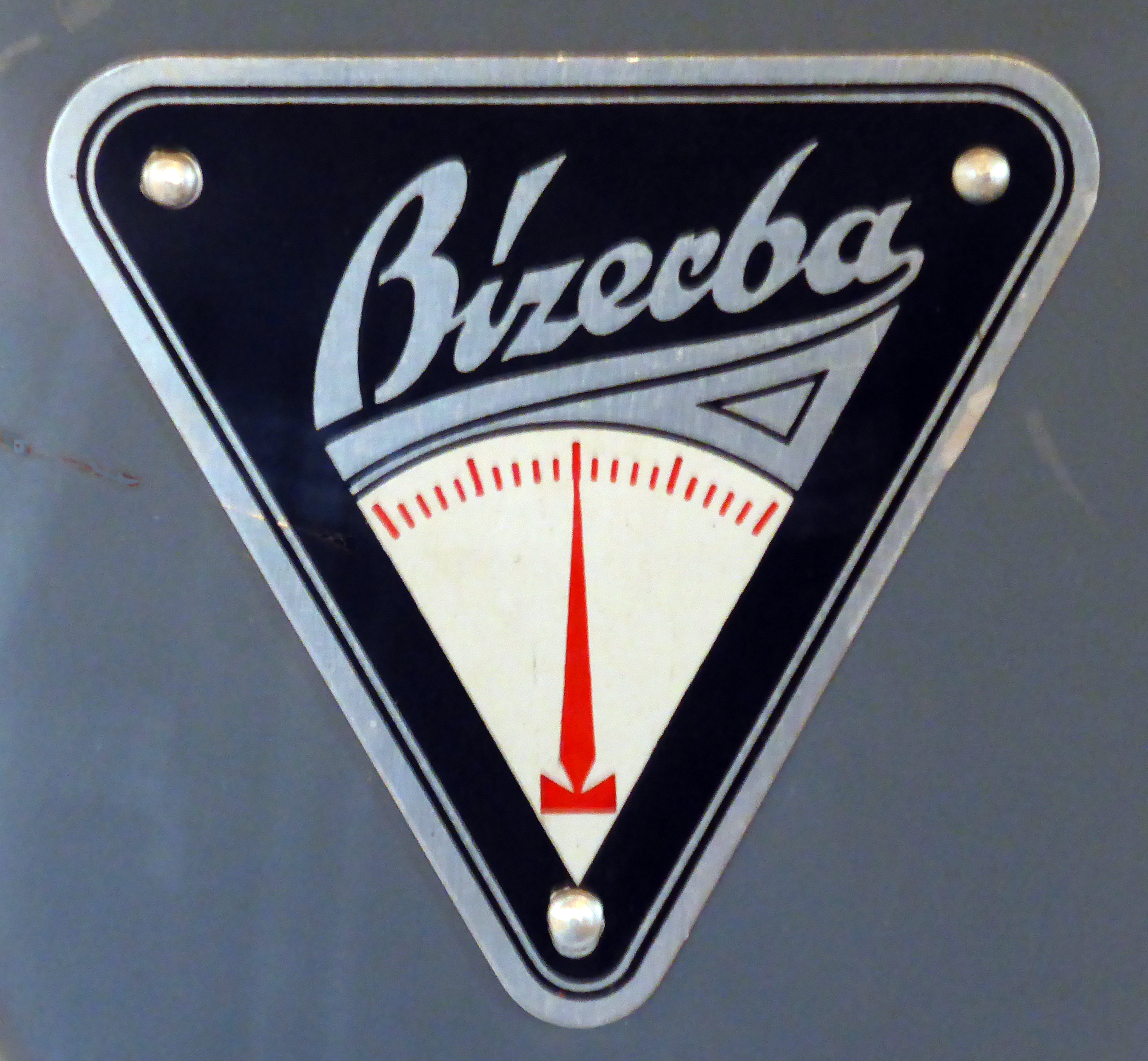 Bizerba-Markenschild 1930er Jahre. Ausgestellt im Museum Schloss Wolkenstein (Erzgebirge).